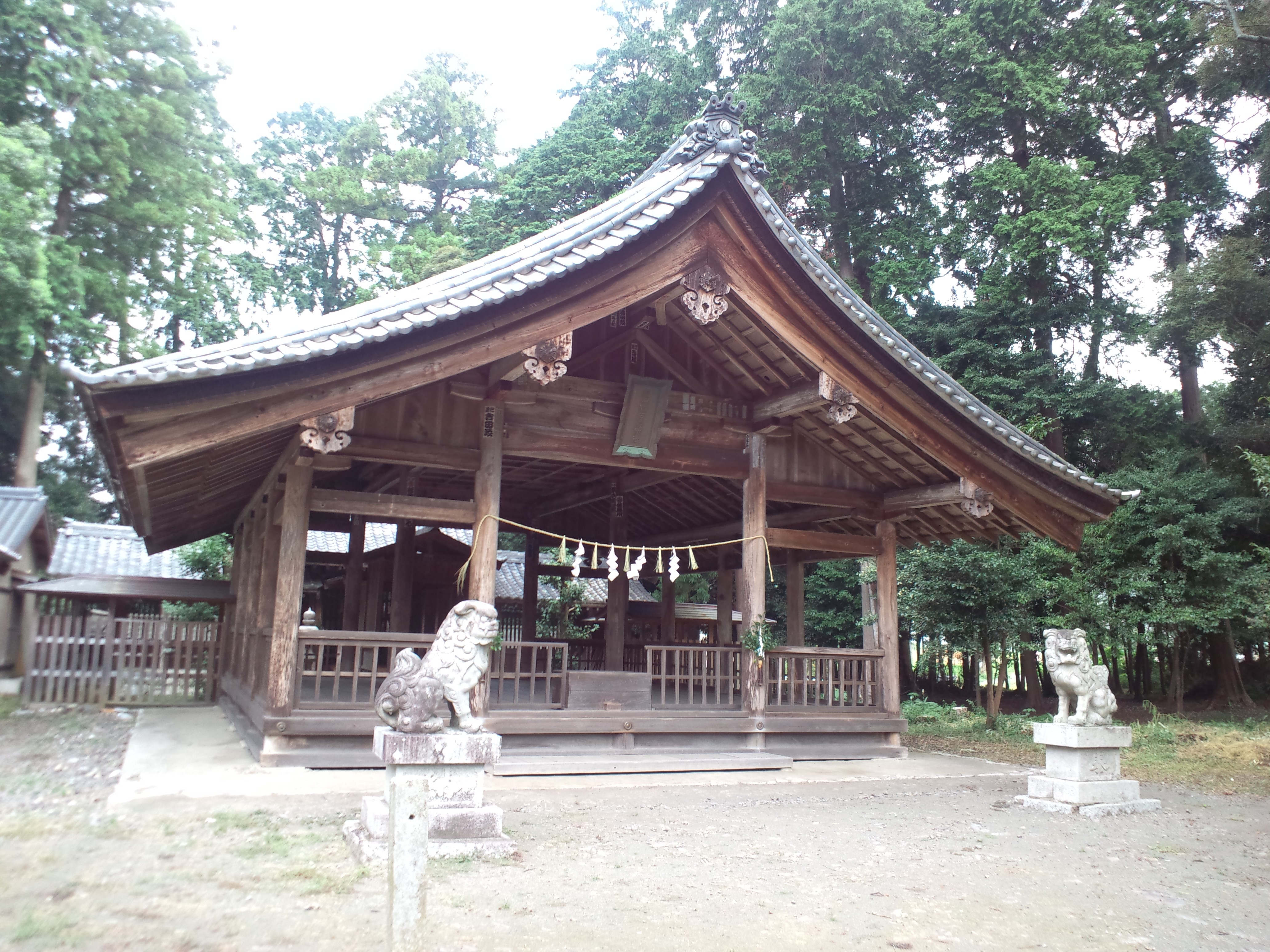 石巻神社 下の宮 社殿